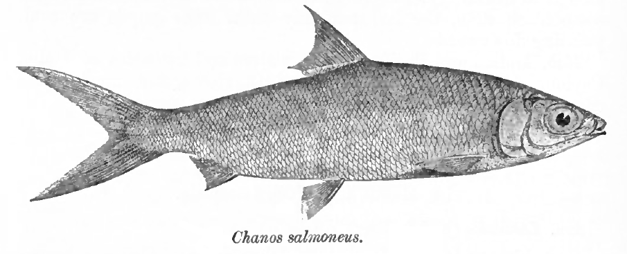 Chanos salmoneus = Chanos chanos (Forsskål, 1775)